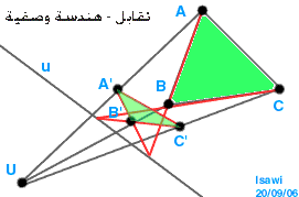 link My personal site Licensing تصنيف:هندسة وصفية